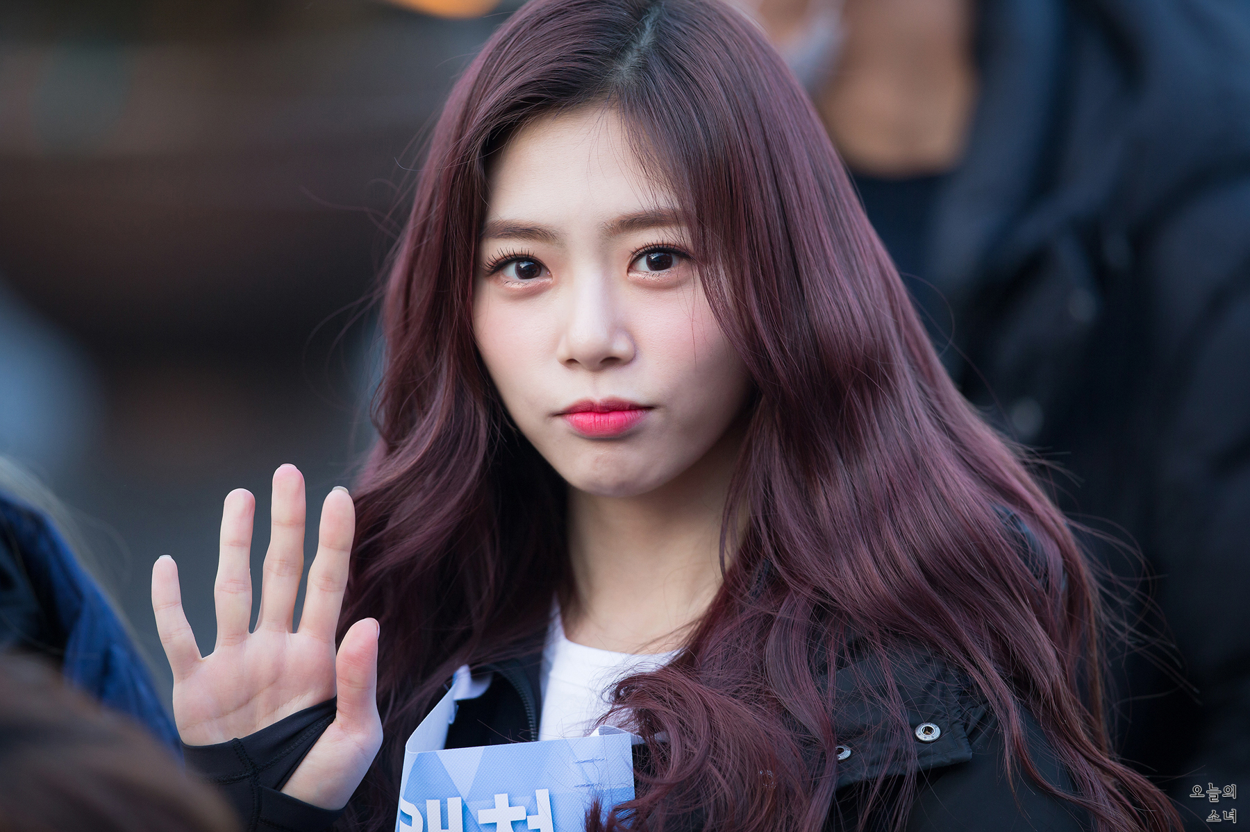 180115 아육대 출근길 드림캐쳐 지유